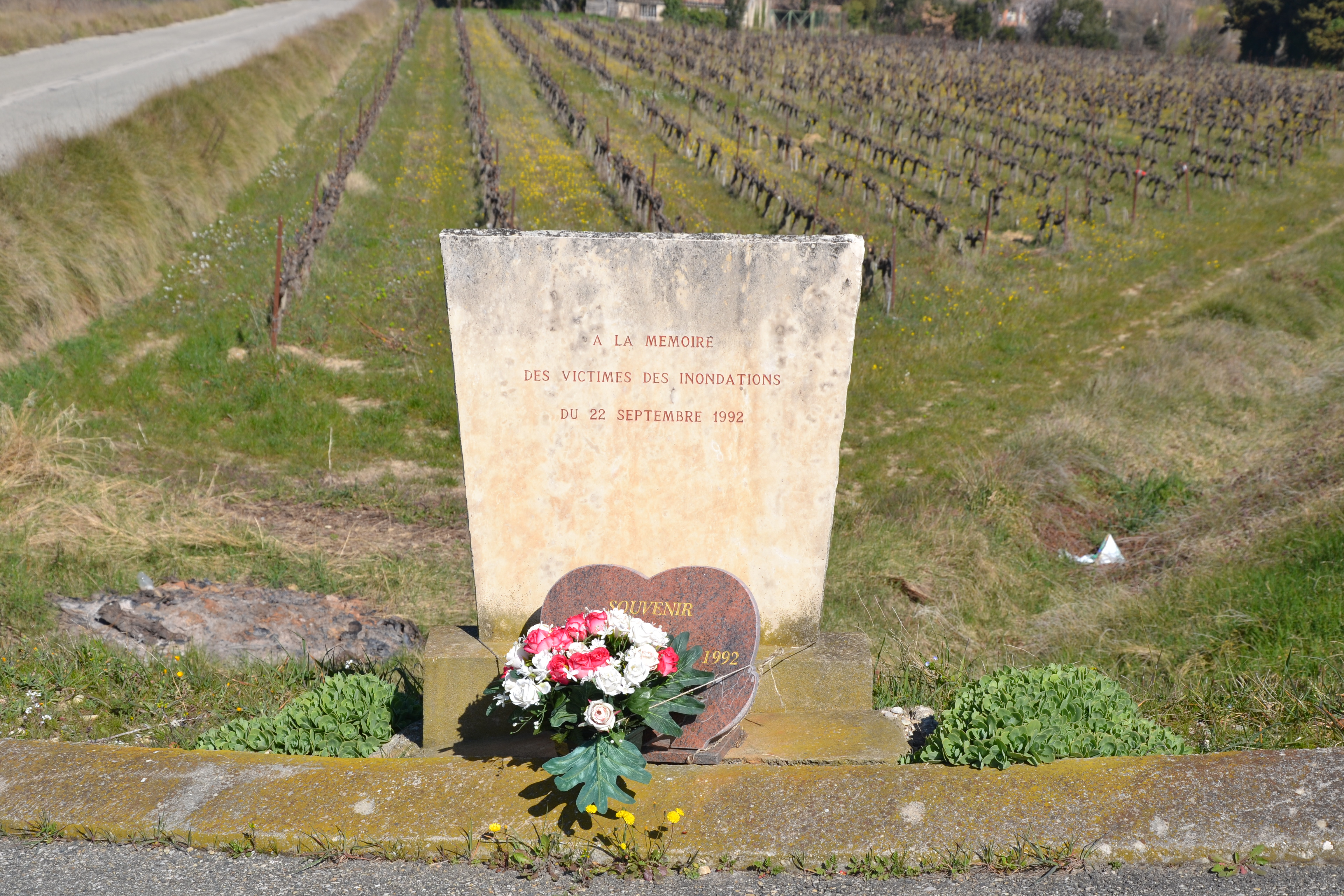 Stèle à la mémoire des victimes des inondations du 22 septembre 1992, en bord dfe l'Ouvèze, à Roaix